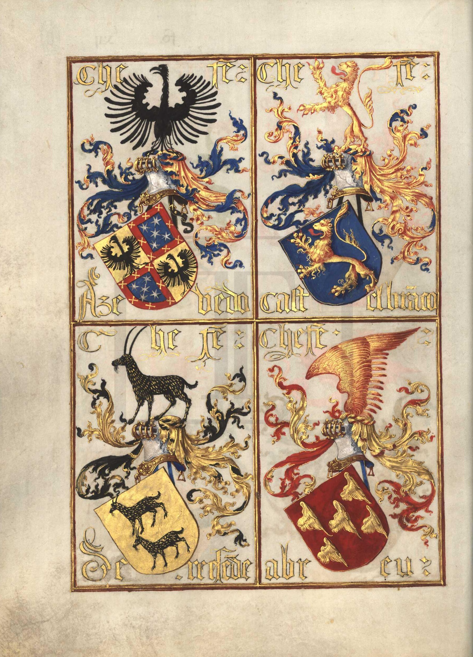 Livro da Nobreza e Perfeiçam das Armas (fl 12v